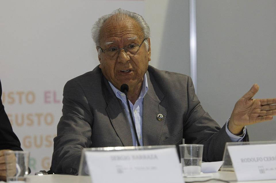 Rodolfo Cerrón Palomino en la Feria del Libro Ricardo Palma, 2015. Presentación de libro: Juan de Betanzos y el Tahuantinsuyo. Nueva edición de la Suma y Narración de los Incas de Francisco Hernández y Rodolfo Cerrón-Palomino.